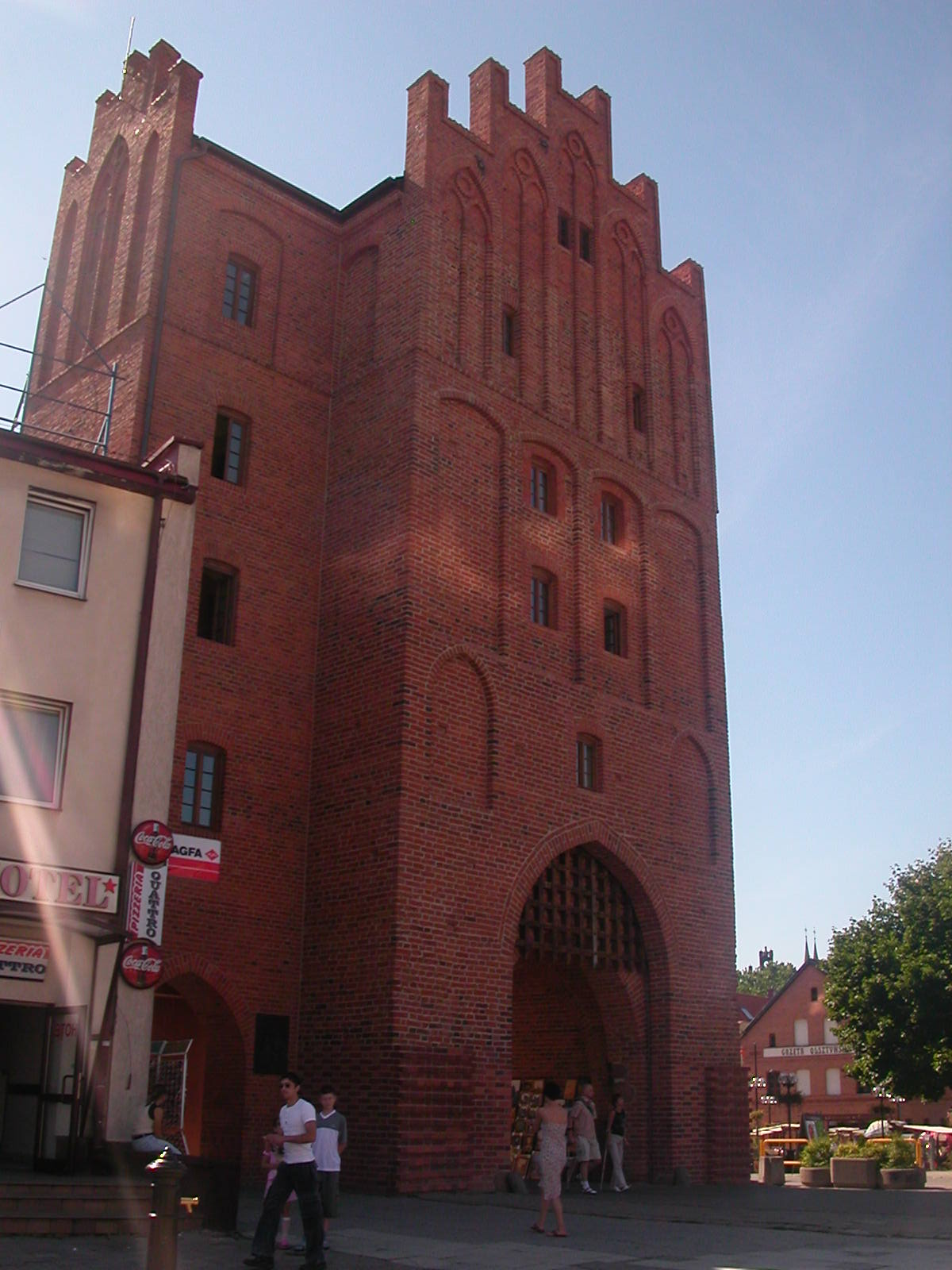 Olsztyn - Wysoka Brama na Starym Mieście